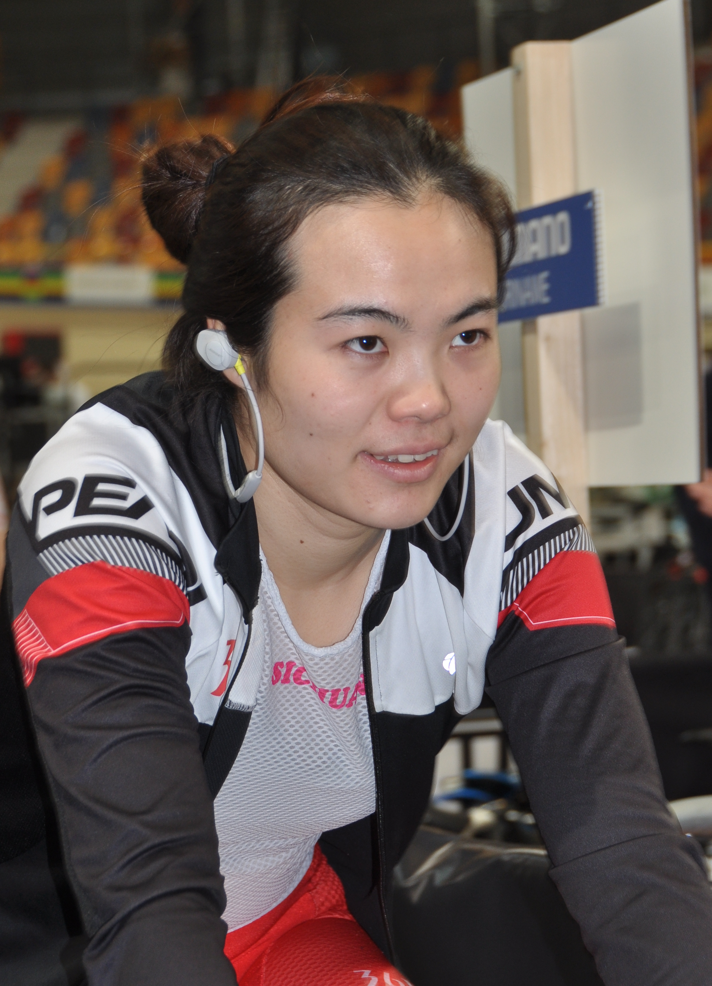 Liu Jiali, cyclist from China